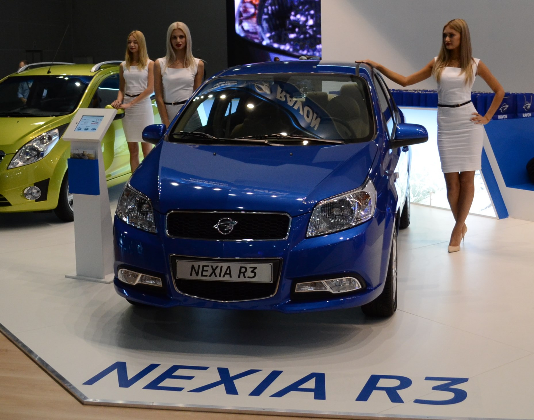 Автомобиль Ravon Nexia R3 на Московском автосалоне 2016 года